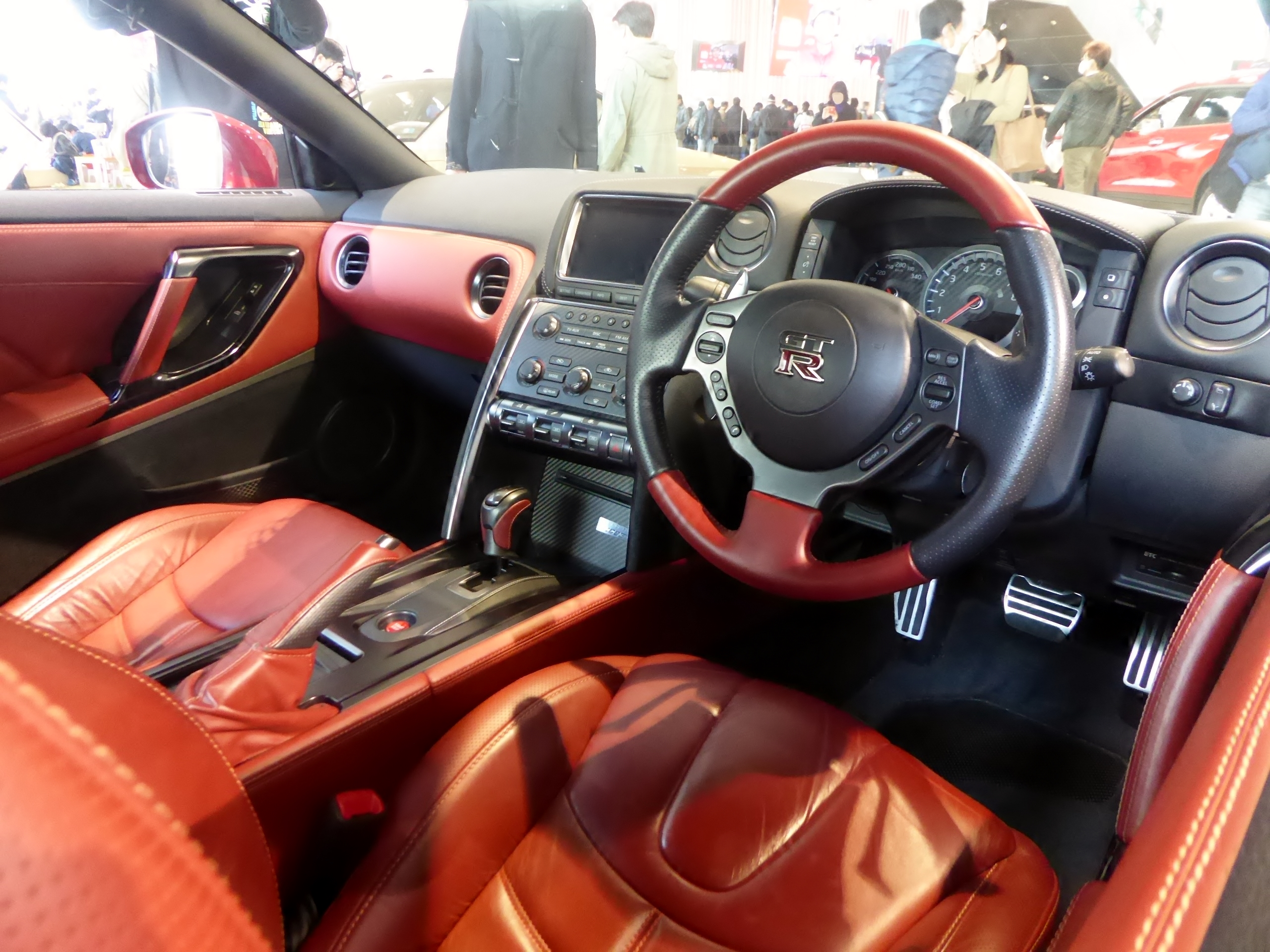 『さらば あぶない刑事』仕様の2014年型日産・GT-Rプレミアムエディションを撮影。